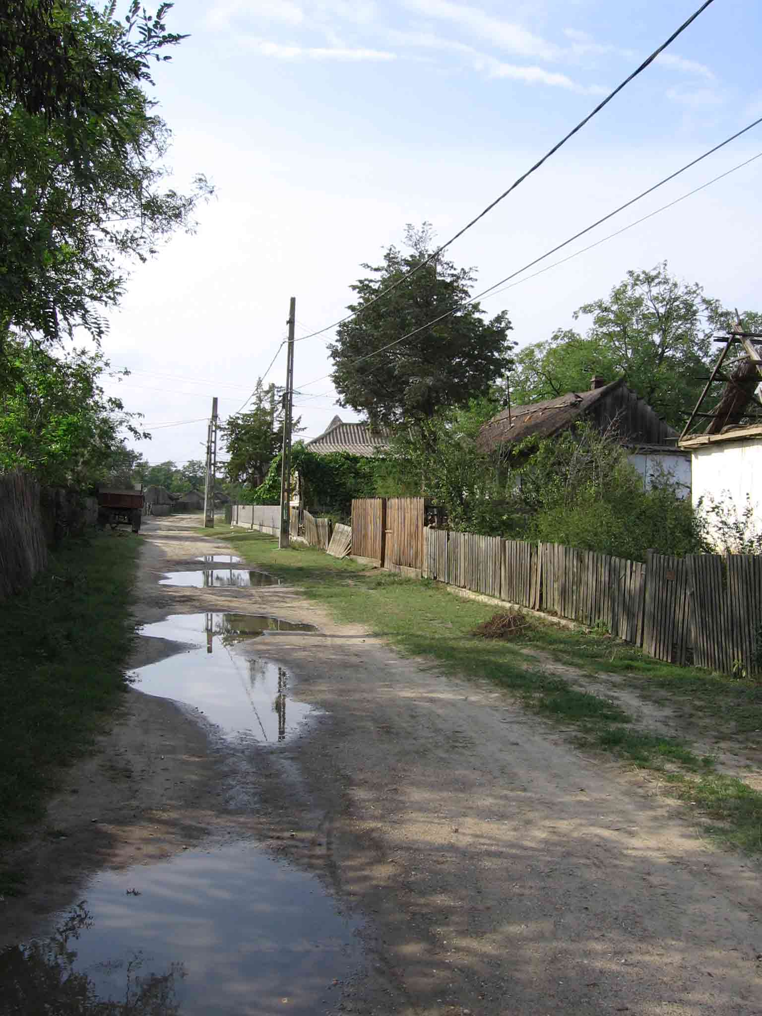 street in sfantu gheorghe, danube delta, romania